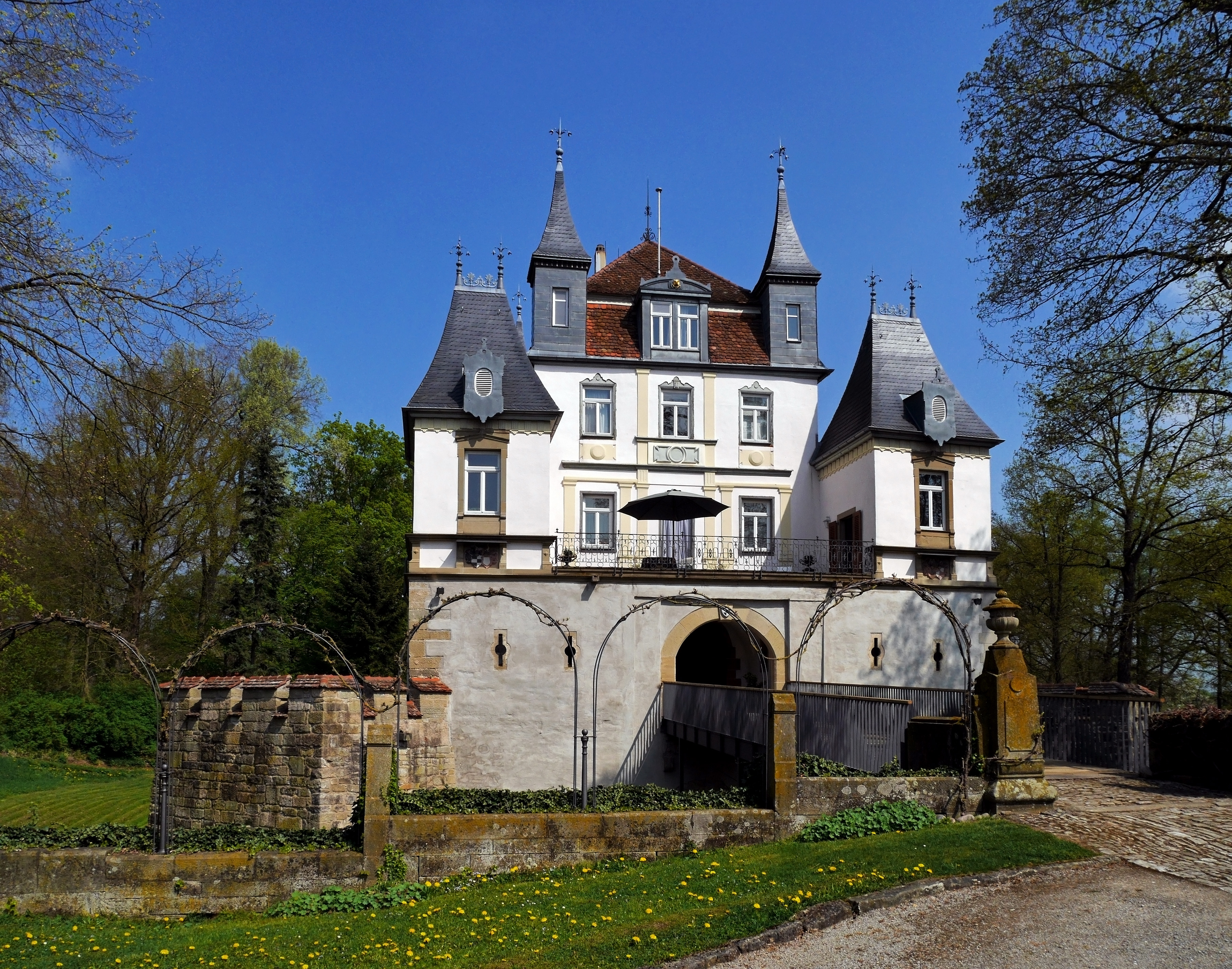 Schloss Eltershofen ist ein historischer Profanbau in Eltershofen, einem Stadtteil von Schwäbisch Hall. Das Schloss wurde im 17. Jahrhundert als Lustschloss von Patriziern erbaut. Das Schloss befindet sich seit 1896 in Besitz der Grafen von Westerholt.